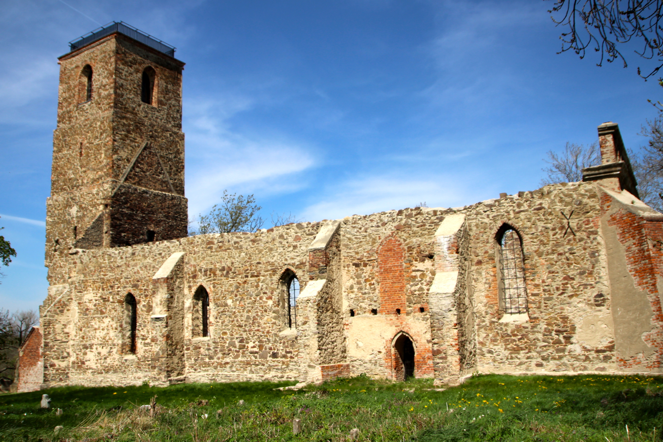 Włodzienin – Ruina kościoła cmentarnego pw. św. Mikołaja we wsi Włodzienin w Polsce, w województwie opolskim, w powiecie głubczyckim, w gminie Głubczyce, w gminie Branice.